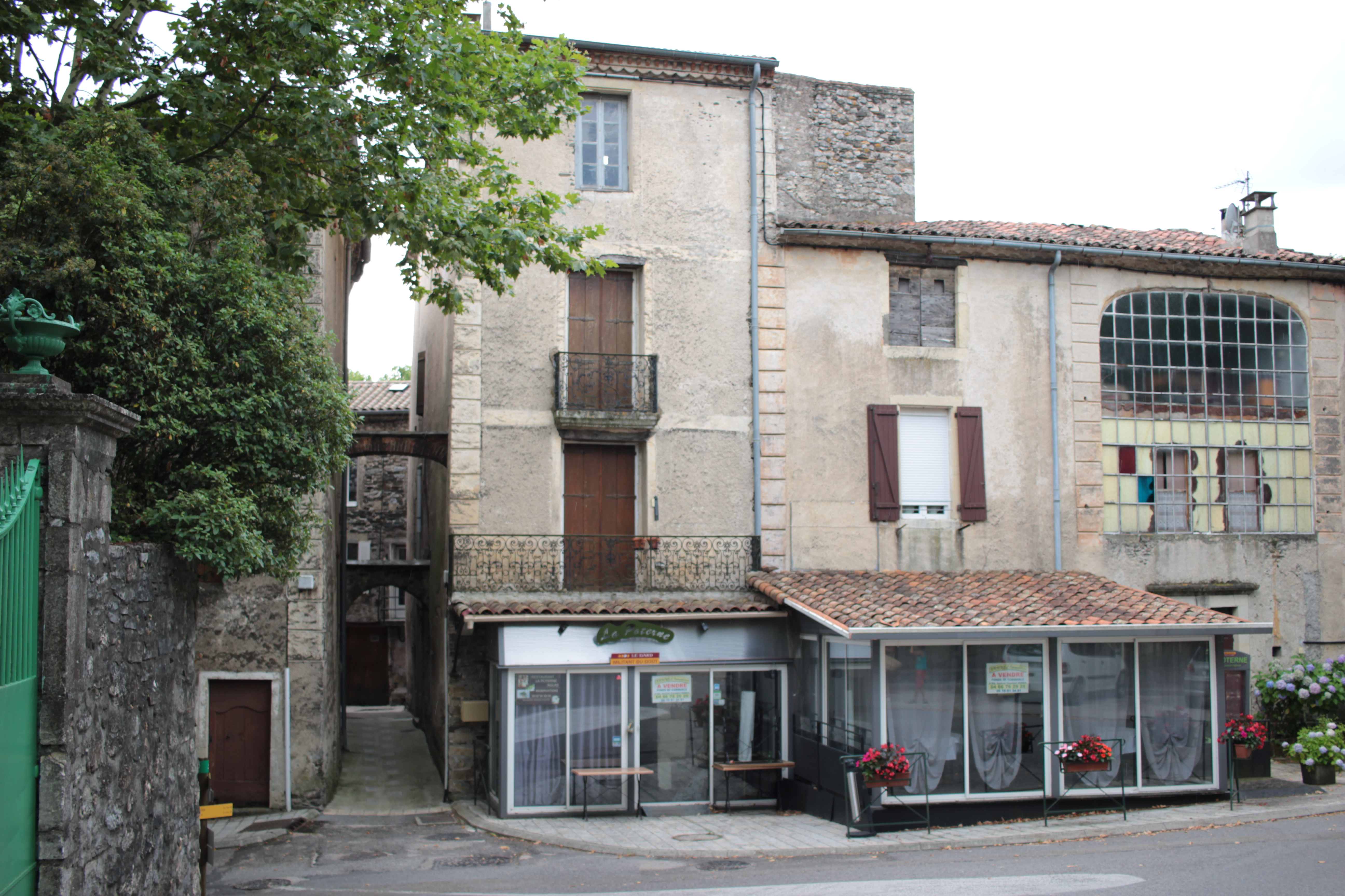 des habitations du centre d'Aulas